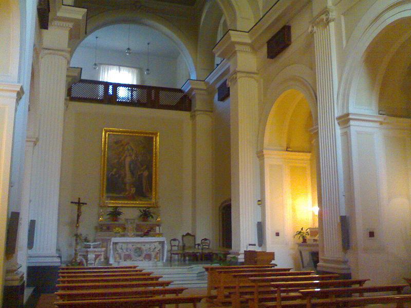 Chiesa di Santa Monica (Napoli, via Santa Monica)